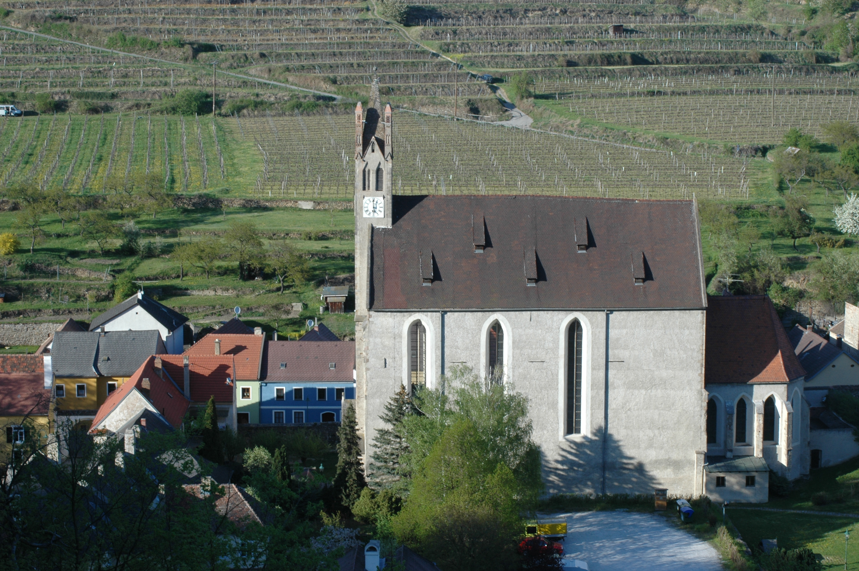 Blick auf die Kirche von Imbach (Gemeinde Senftenberg)